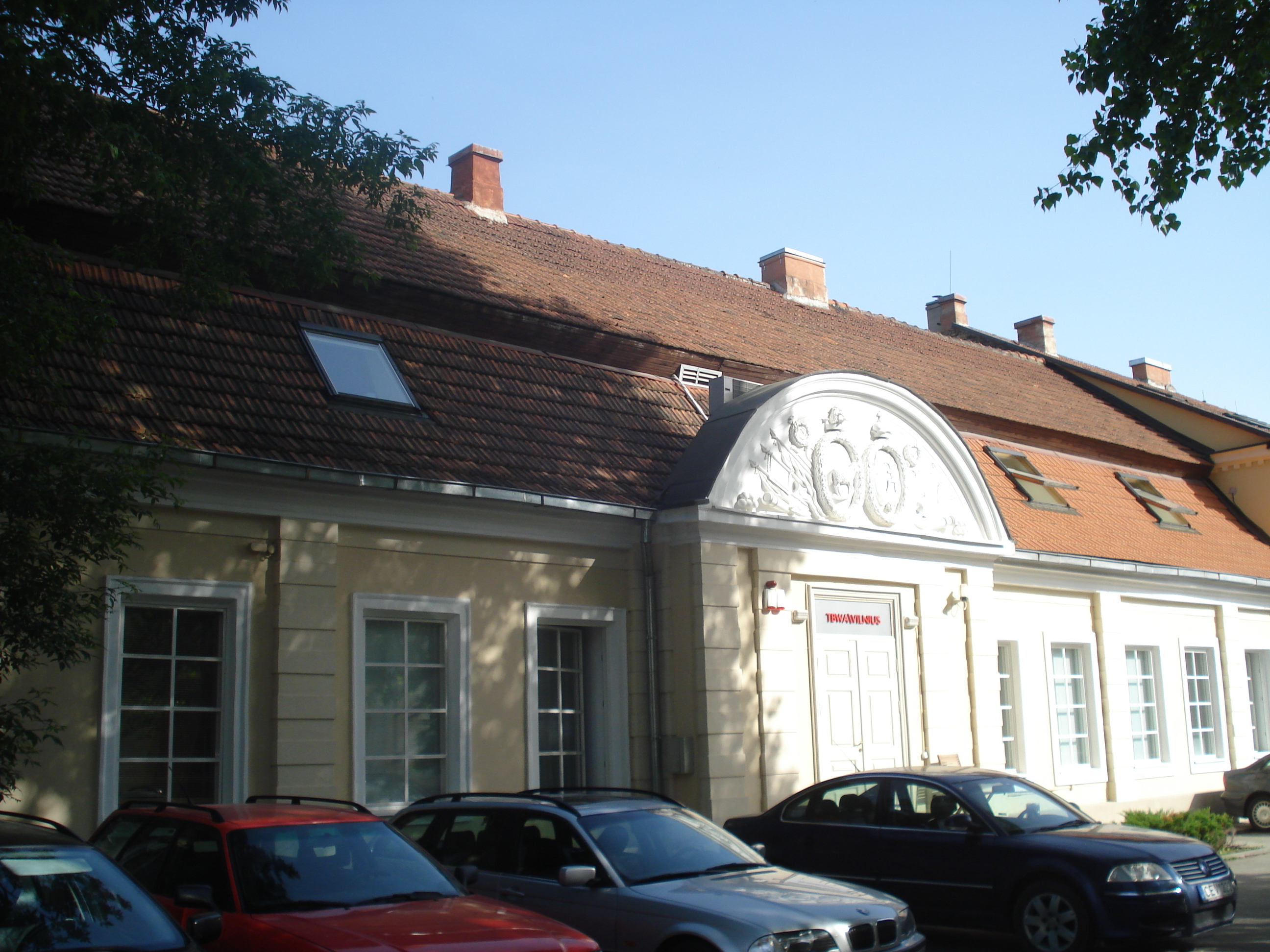 Репрезентативное здание ансамбля помещичьей резиденции позднего барокко с чертами рококо. Тилто 1, Вильнюс